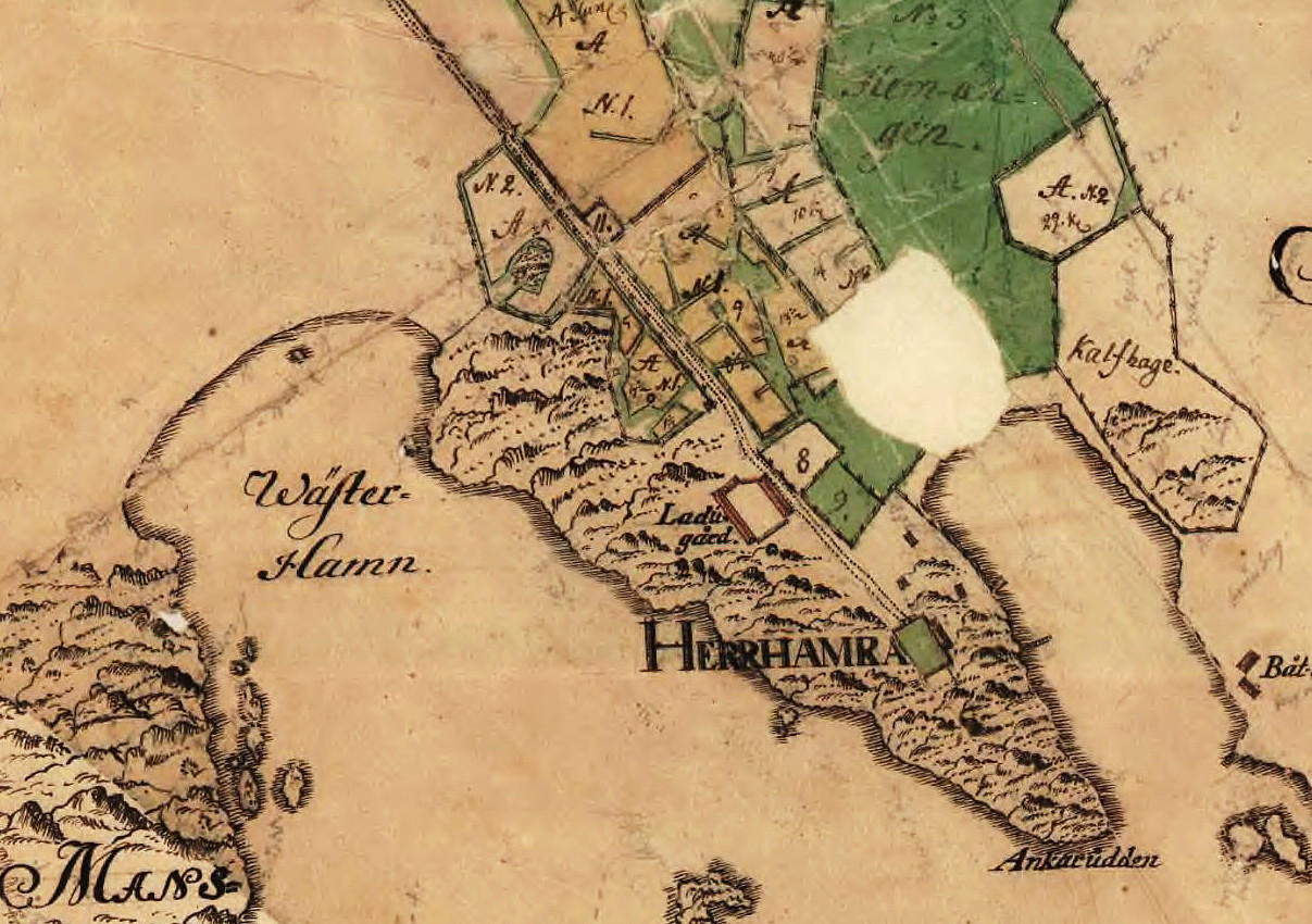 Charta över Säterigården Herrhamra på Ankarudden i Sotholms härad, Sorunda socken (kartan är beskuren)